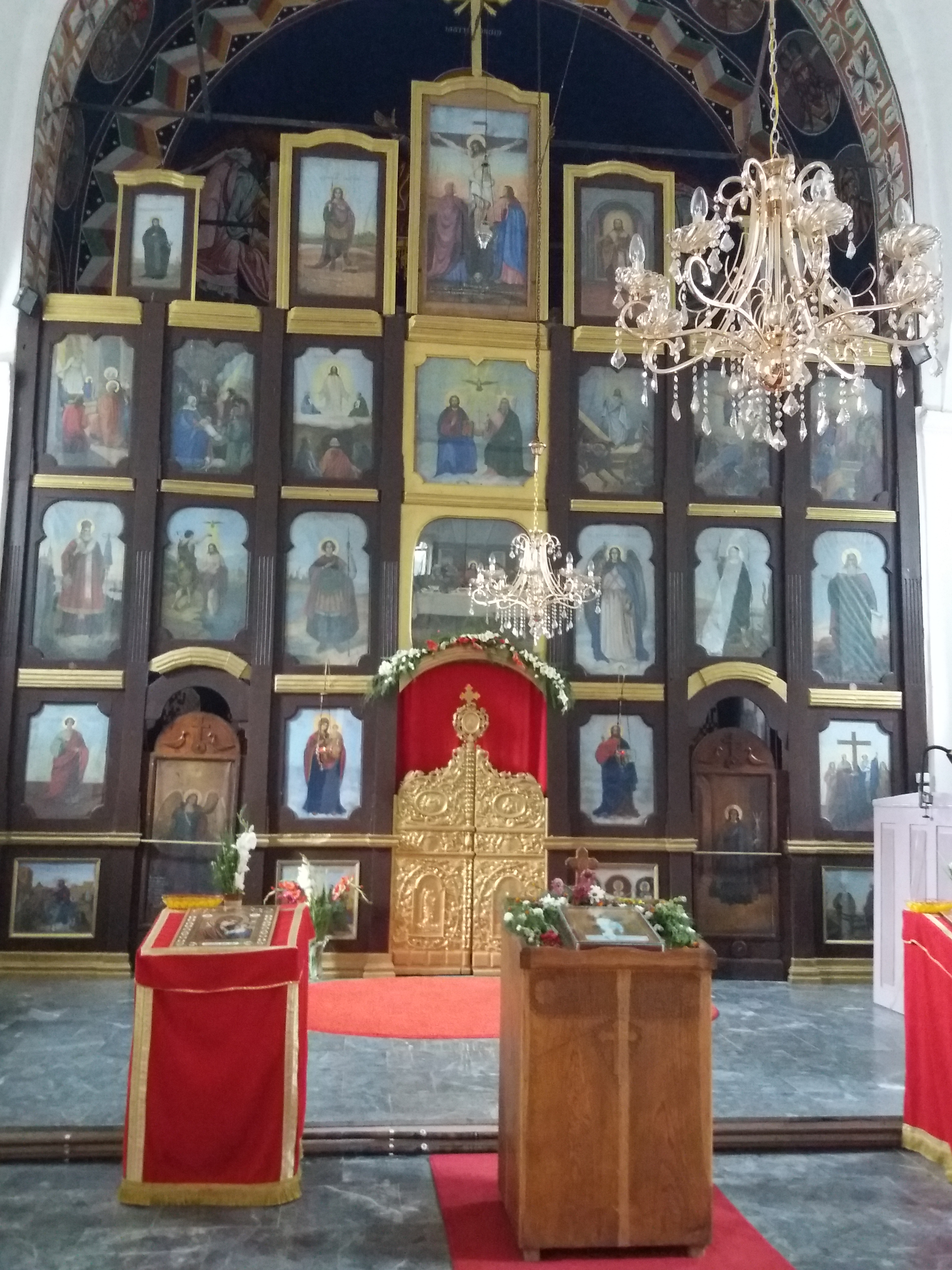 Srpski (latinica): Manastir Pinosava, Kusadak